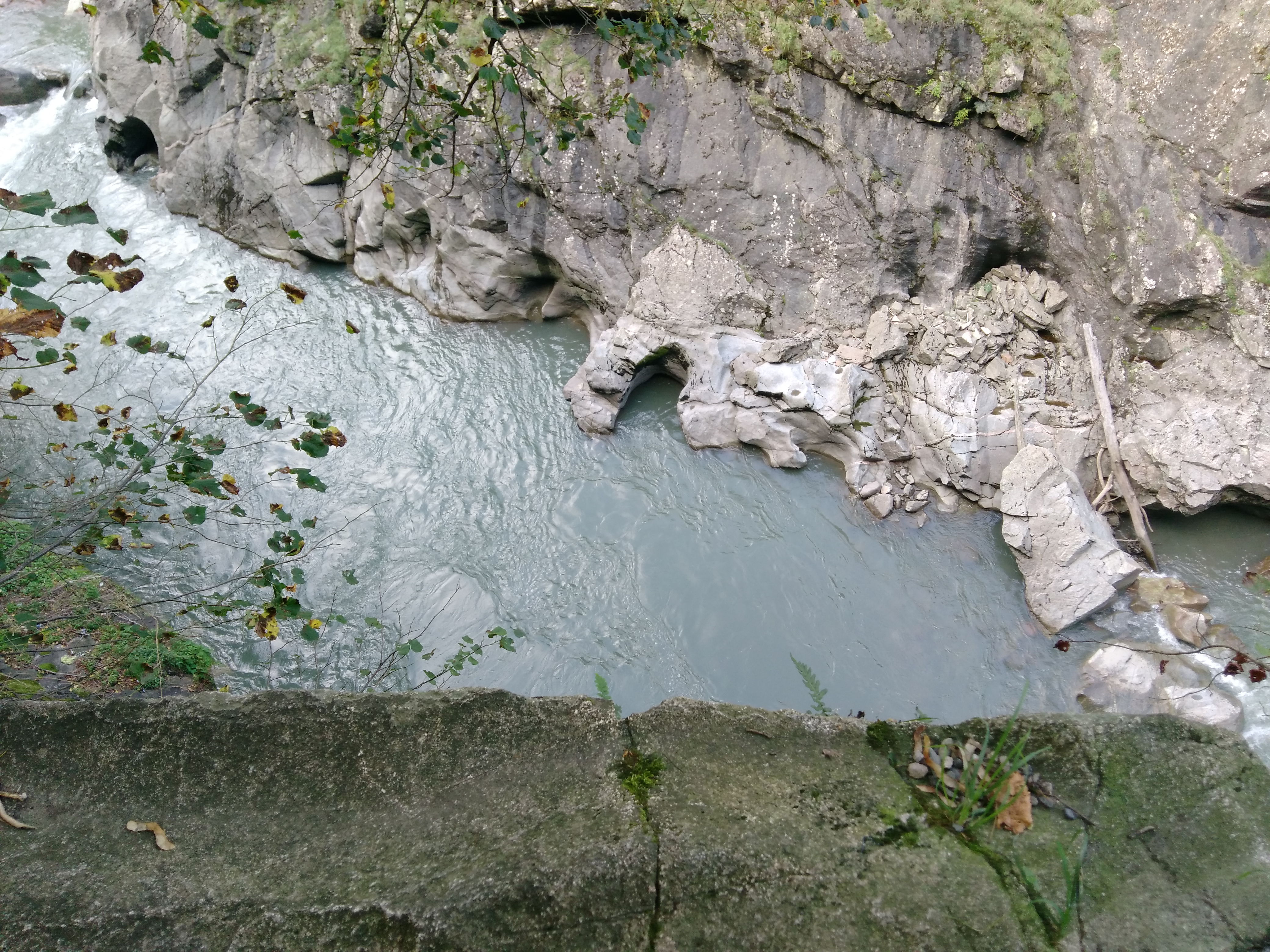 Белая река.